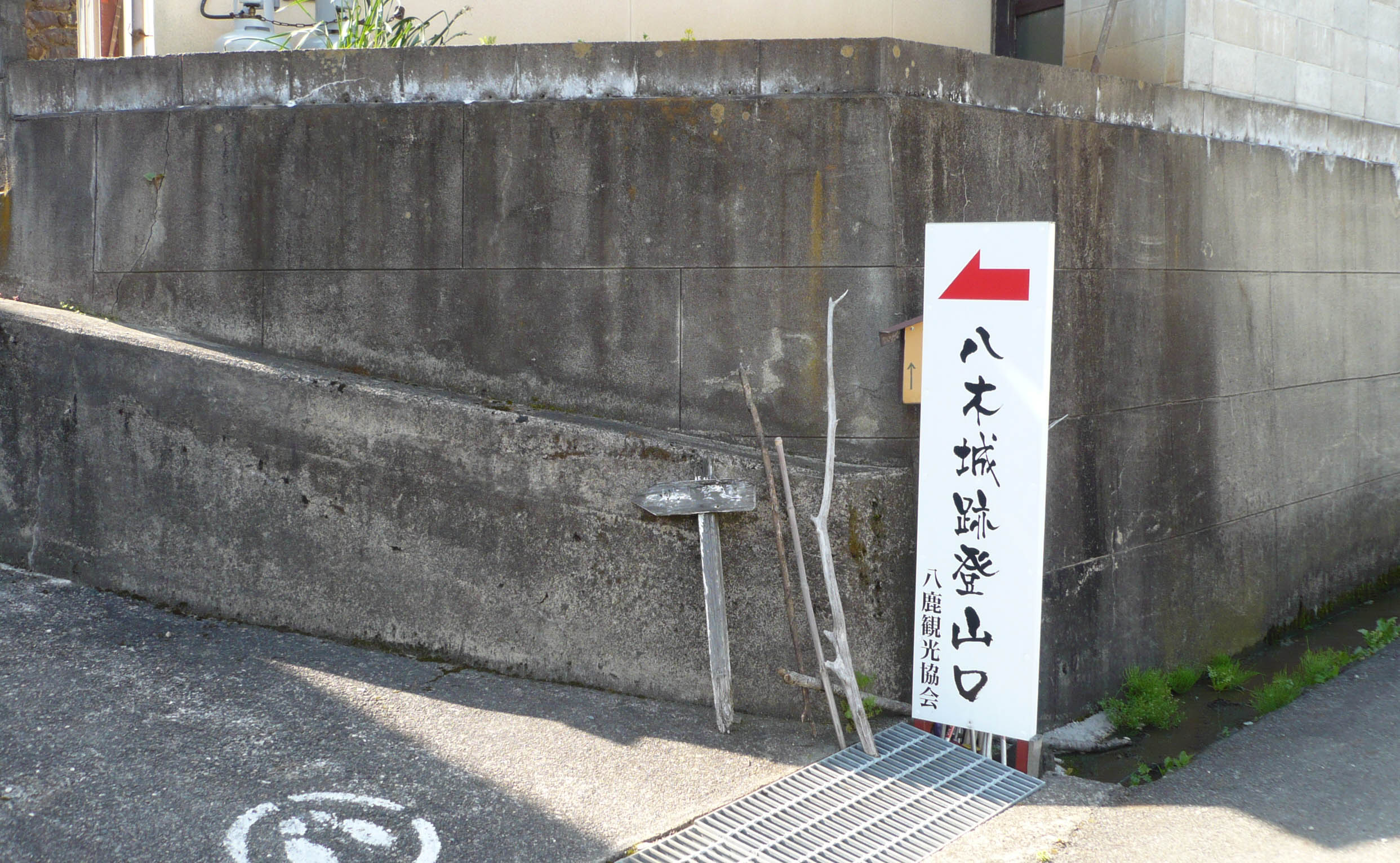 八木城への登山城入口